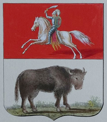 Беларуская (тарашкевіца): Герб Гарадзенскае (Horadnia) губэрні з Пагоняй (Pahonia)